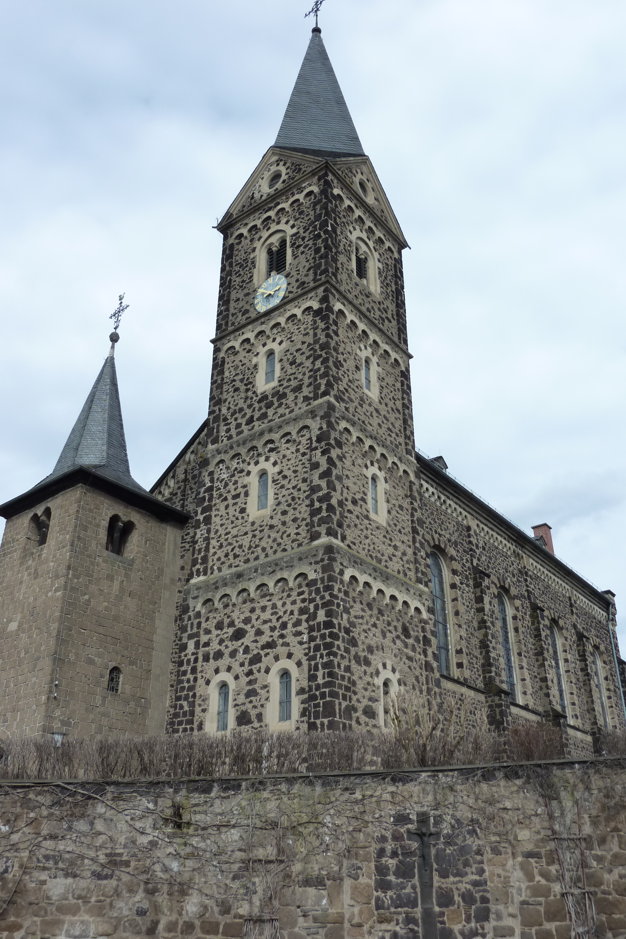 Kirche St. Remigius in Wassenach . neben dem neuromanischem Turm steht noch der alte romanische Turm der Vorgängerkirche